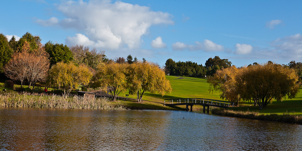 Fagan Park